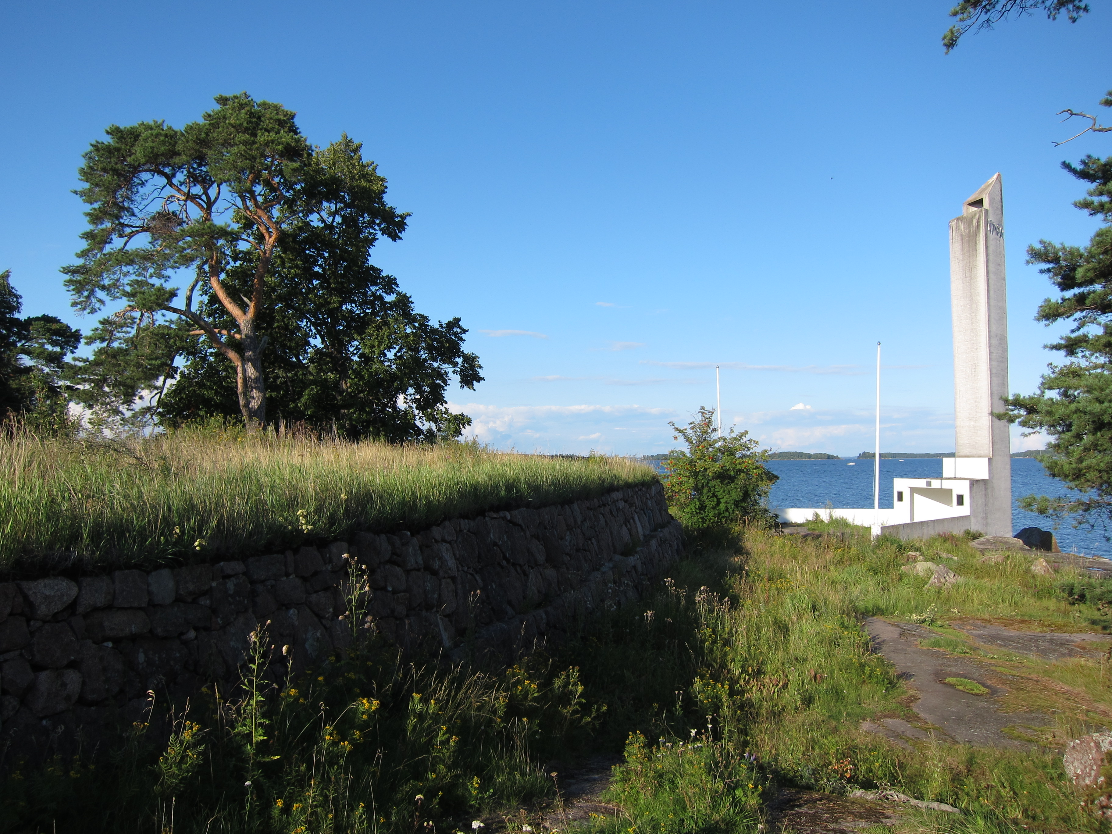 Fort Elisabethin linnoituksen muuria ja Henrik Bruunin Ruotsinsalmen taistelun muistomerkki Varissaaressa Kotkassa.